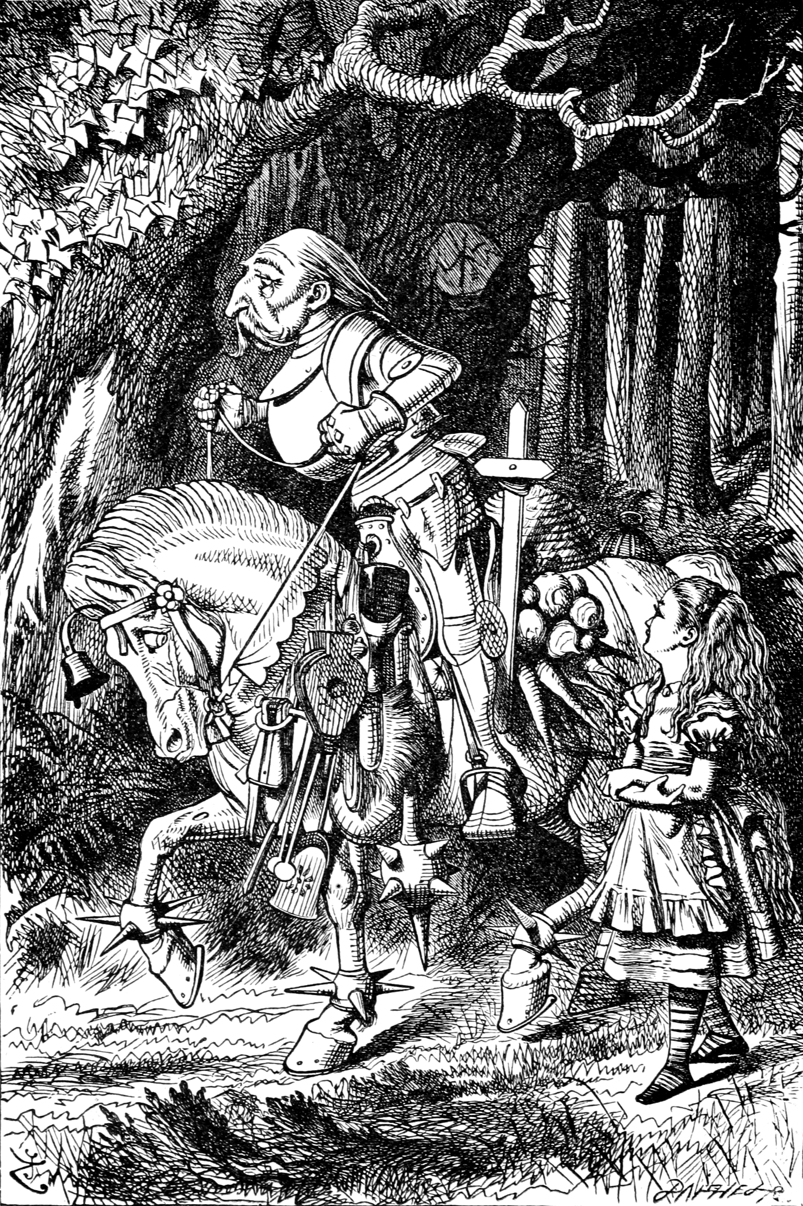 Гравюра Джона Тенниела